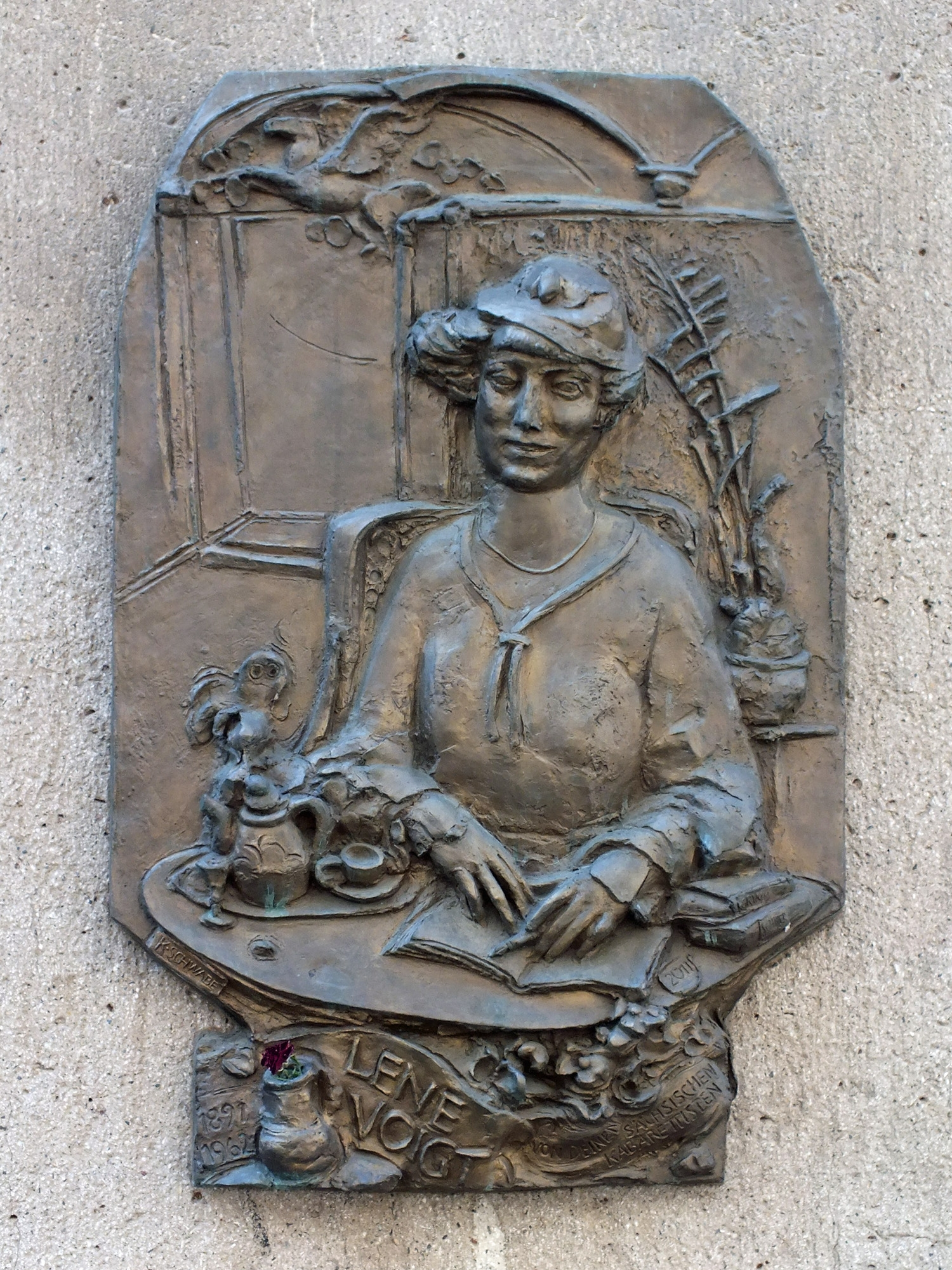 Bronze-Relief zum Andenken an die sächsische Mundartdichterin Lene Voigt in der Leipziger Kupfergasse, gefertigt vom Leipziger Bildhauer Klaus Schwabe 2011